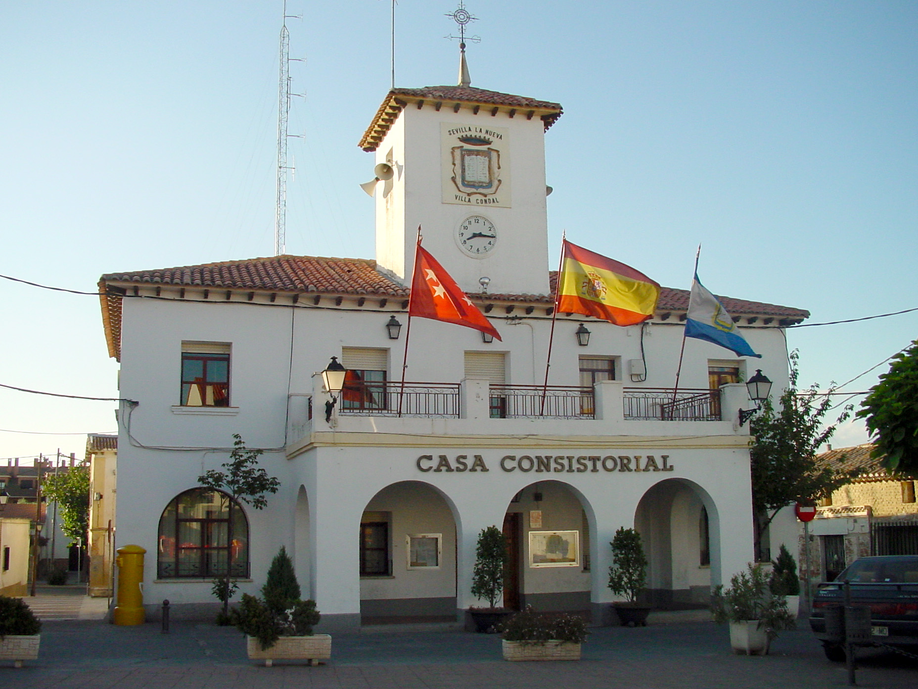 Ayuntamiento de Sevilla la Nueva.